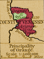 Mapa del Principado de Orange durante 1547